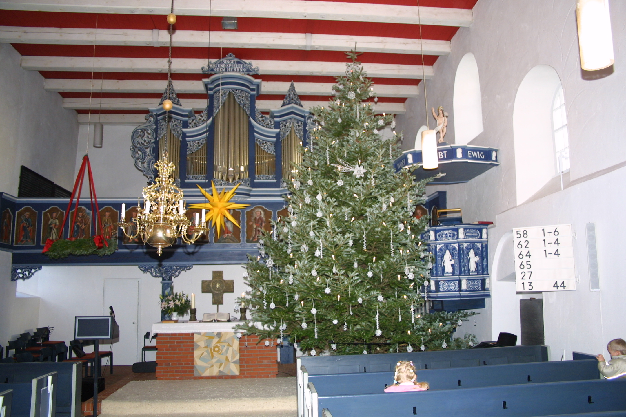 Bagbander Kirche Blick auf den Altar zur Weihnachtszeit